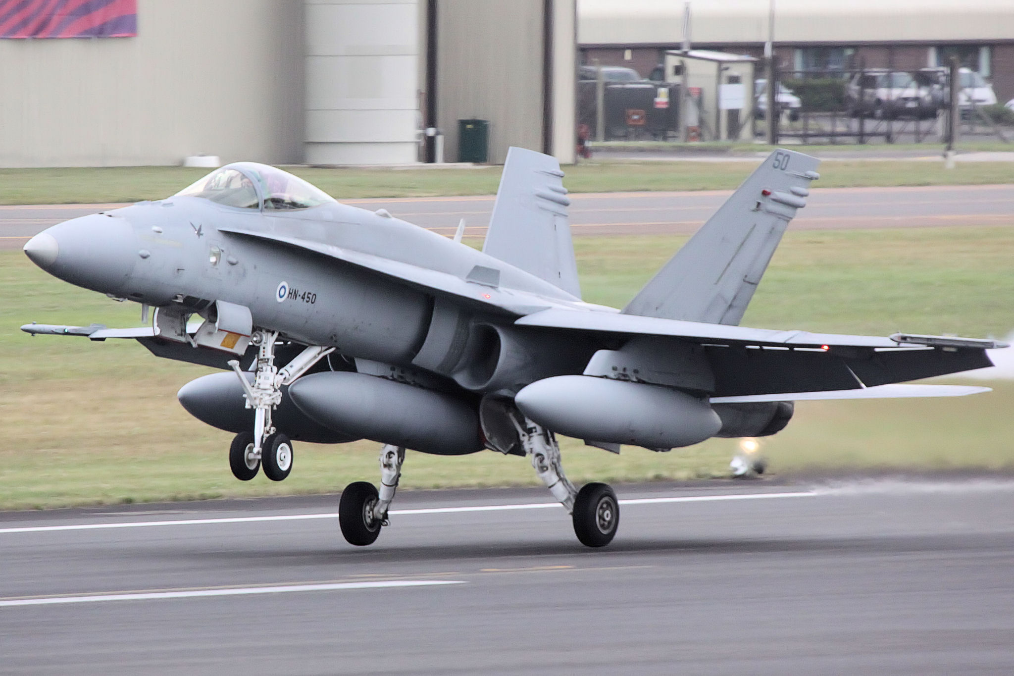 F18 Hornet - RIAT 2009